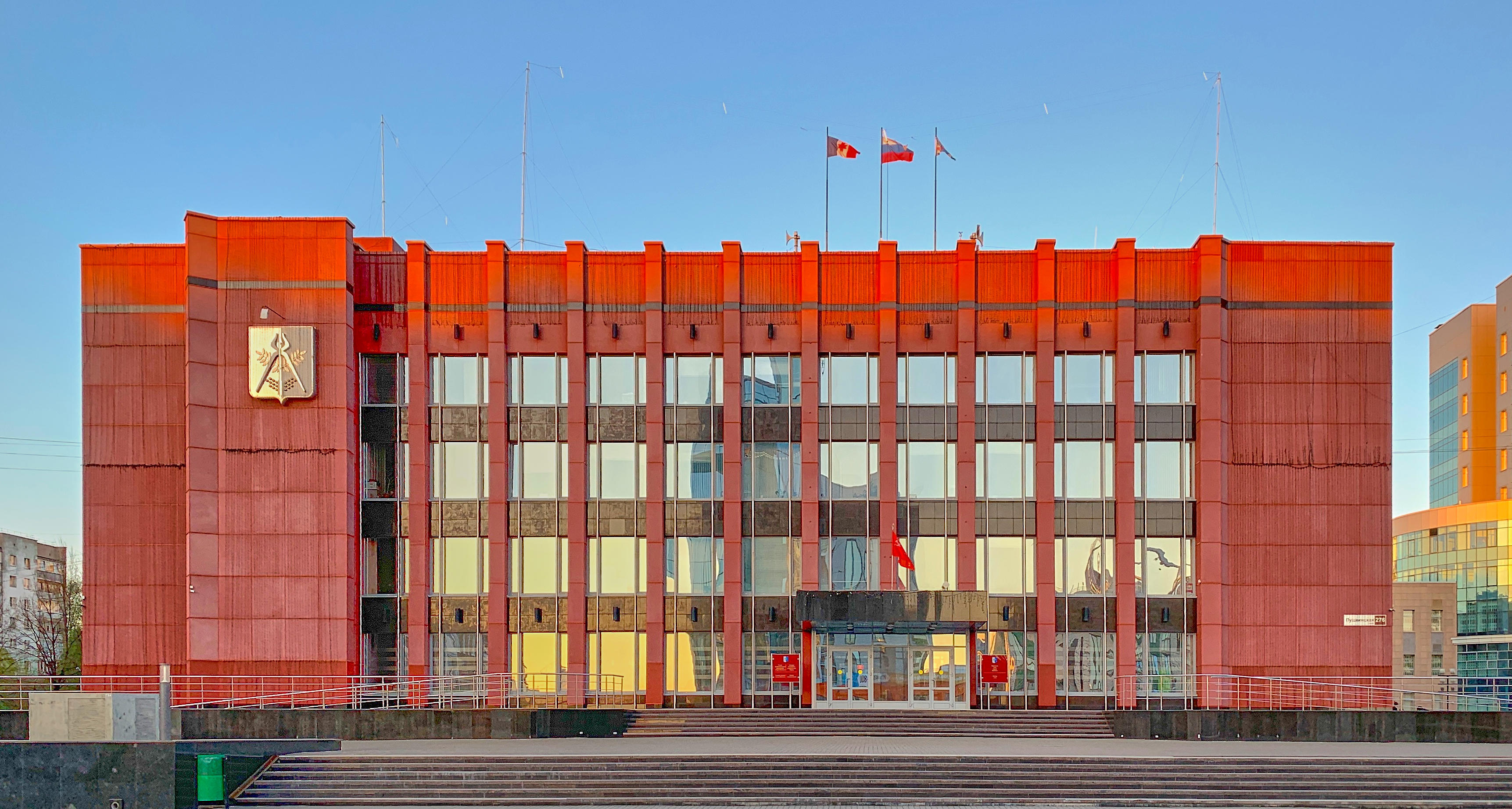 Здание Ижевской городской администрации (ул. Пушкинская, 276)